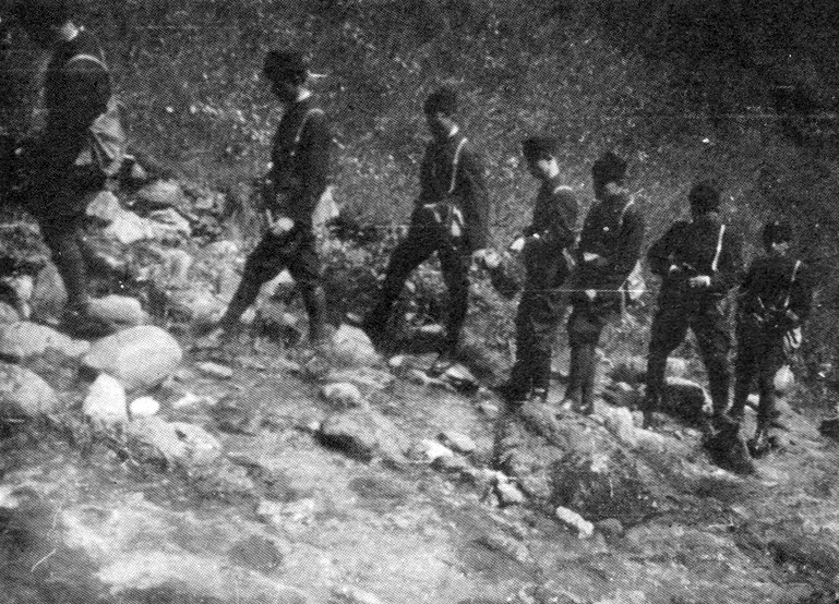 Vlado Černozemski sa ustašama tokom obuke 1934. godine.